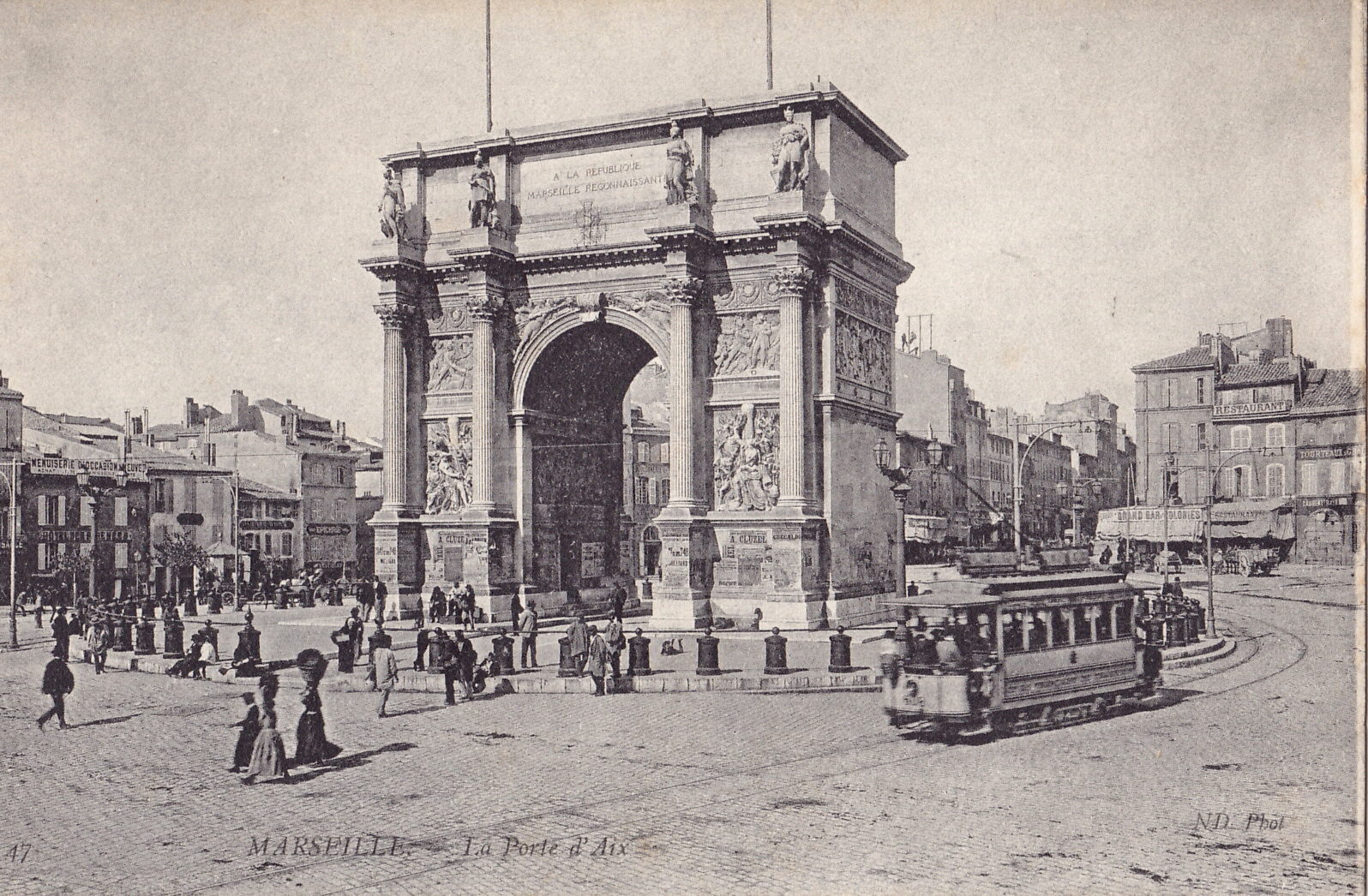 Carte postale ancienne éditée par ND, n°47 : MARSEILLE - La Porte d'Aix